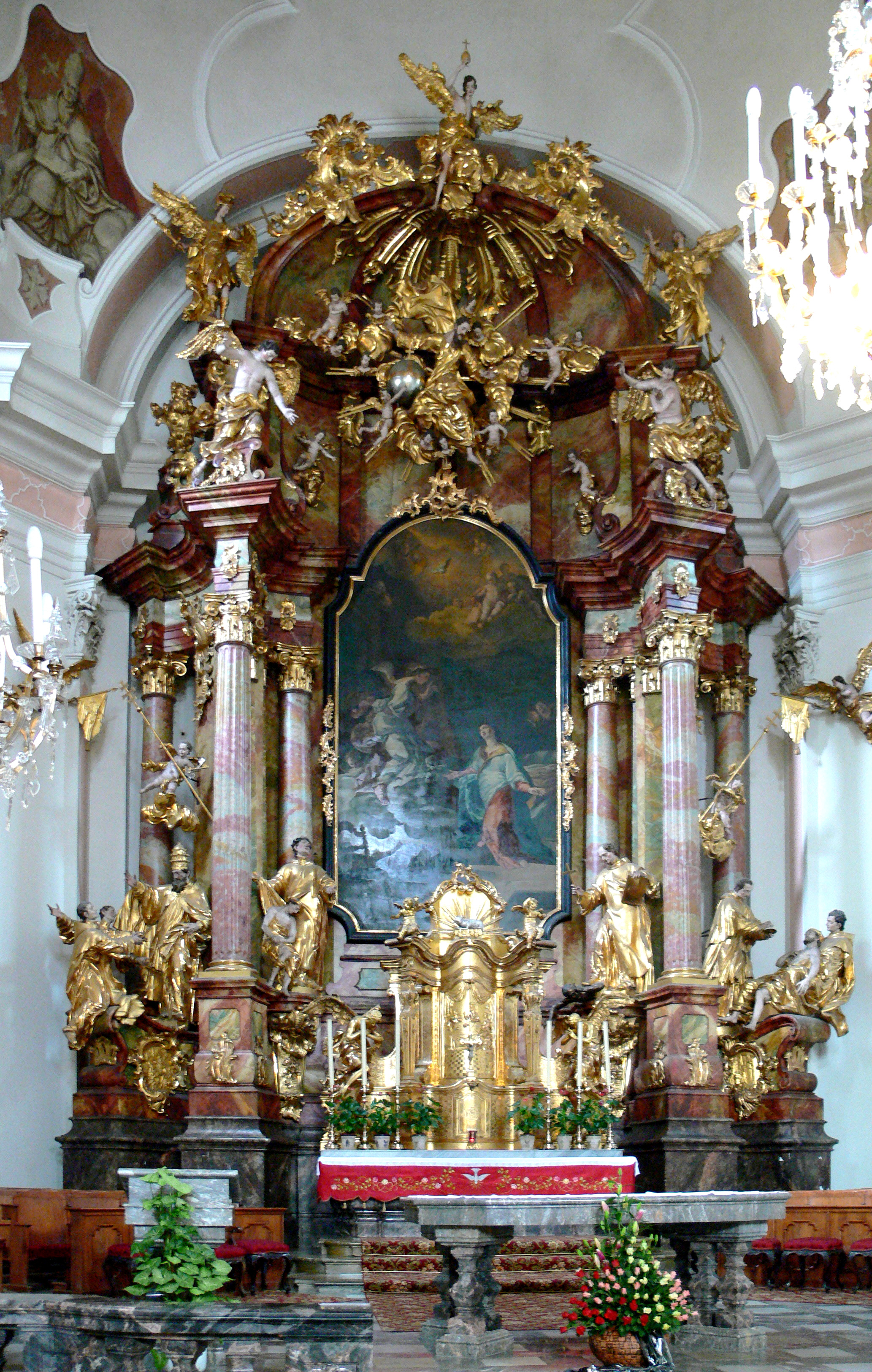 Barmherzigenkirche Mariä Verkündigung (Garnisonskirche), Graz Hochaltar von Josef Schokotnigg